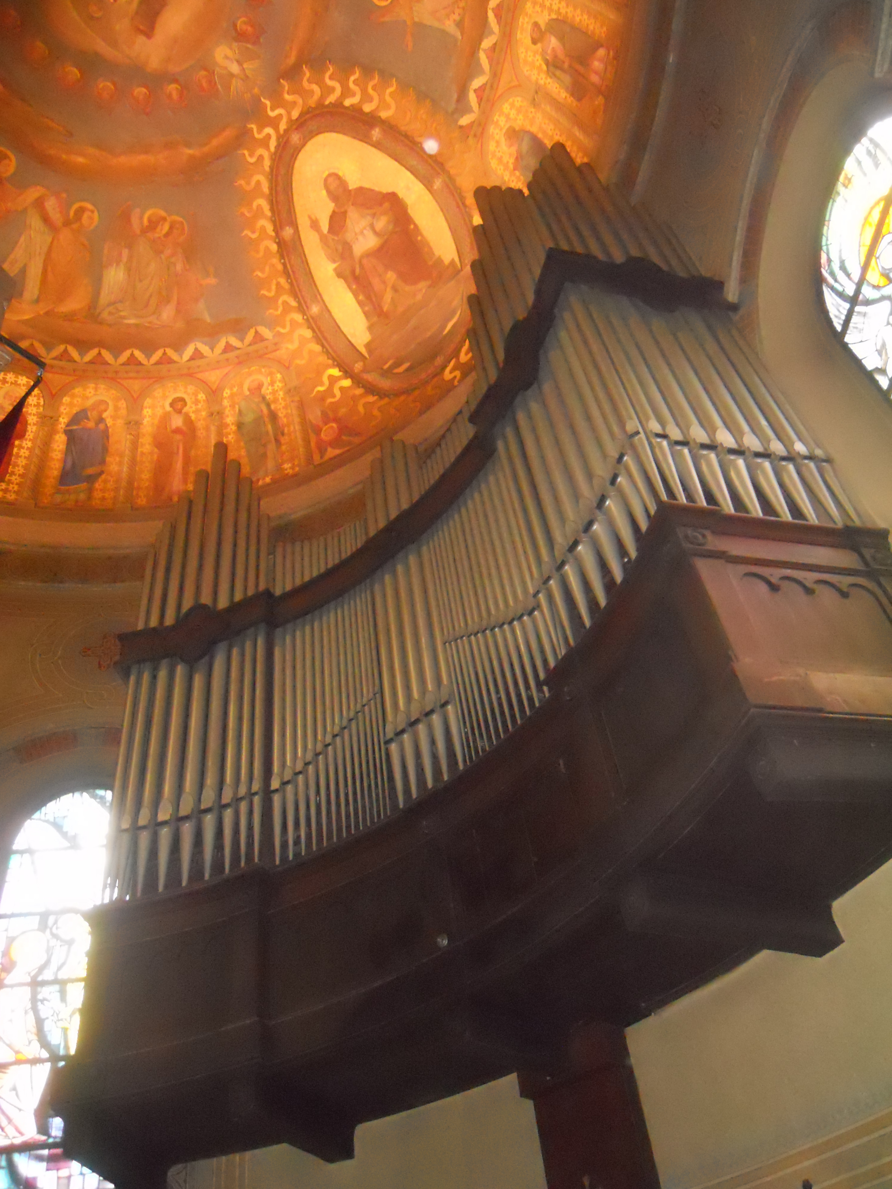 Il corpo absidale dell'organo Balbiani-Vegezzi Bossi della chiesa del Santissimo Redentore a Milano